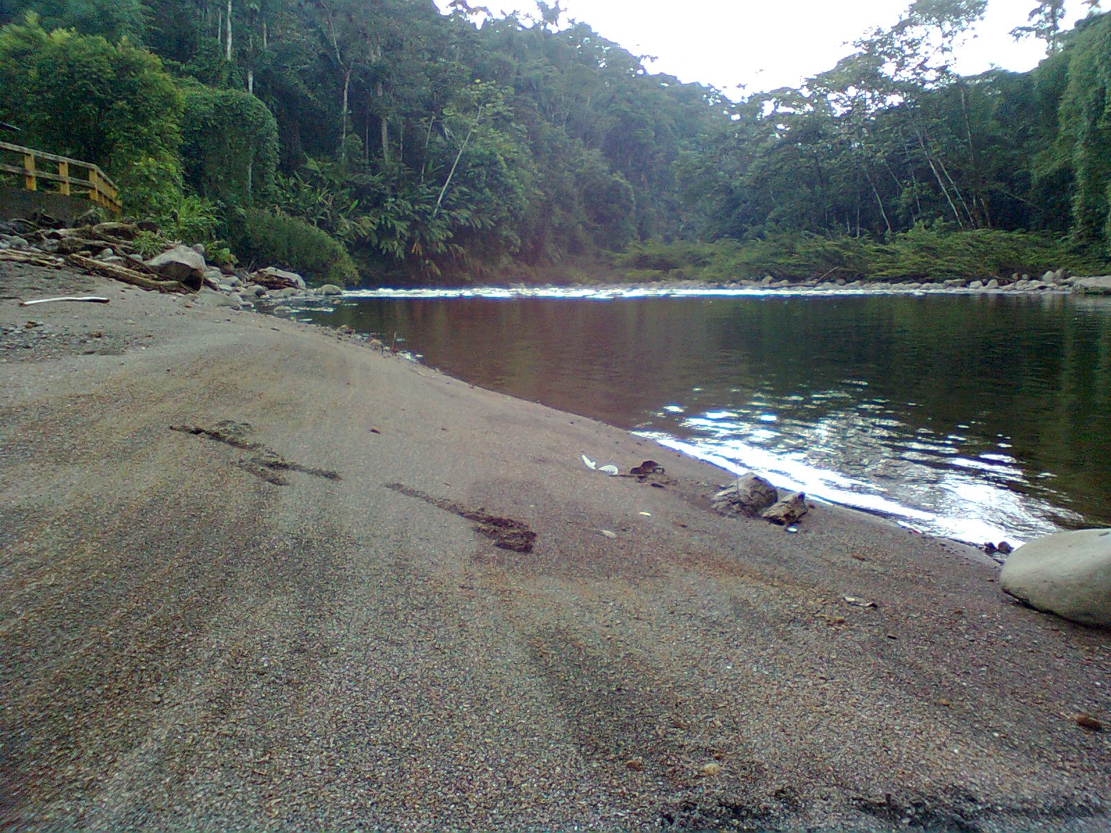 Un balneario que esta ubicado en la Parroquia Tarqui, a 15 minutos de Palora, dispone de canchas de indor y ecuavoley